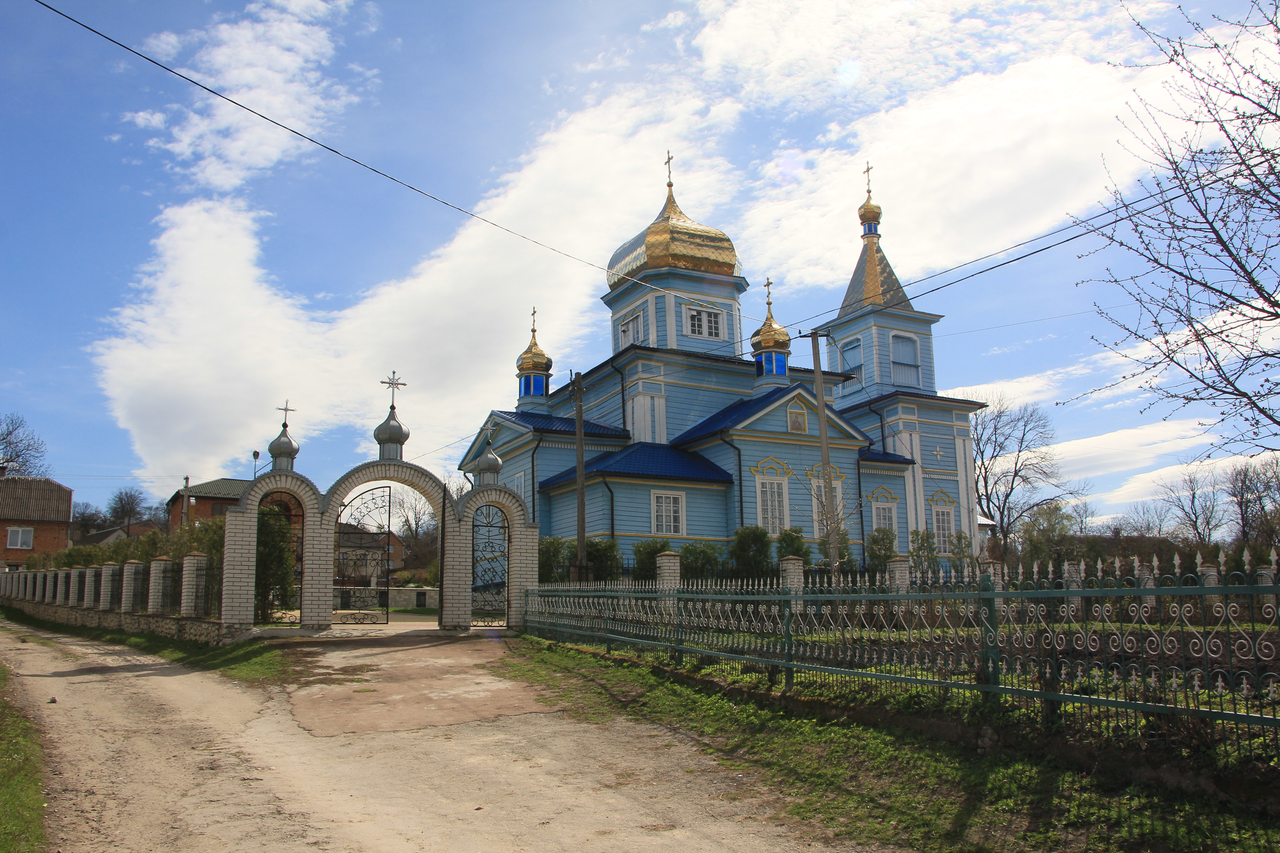 Дерев'яна церква в селі Старий Вишнівець Збаразького району Тернопільської області